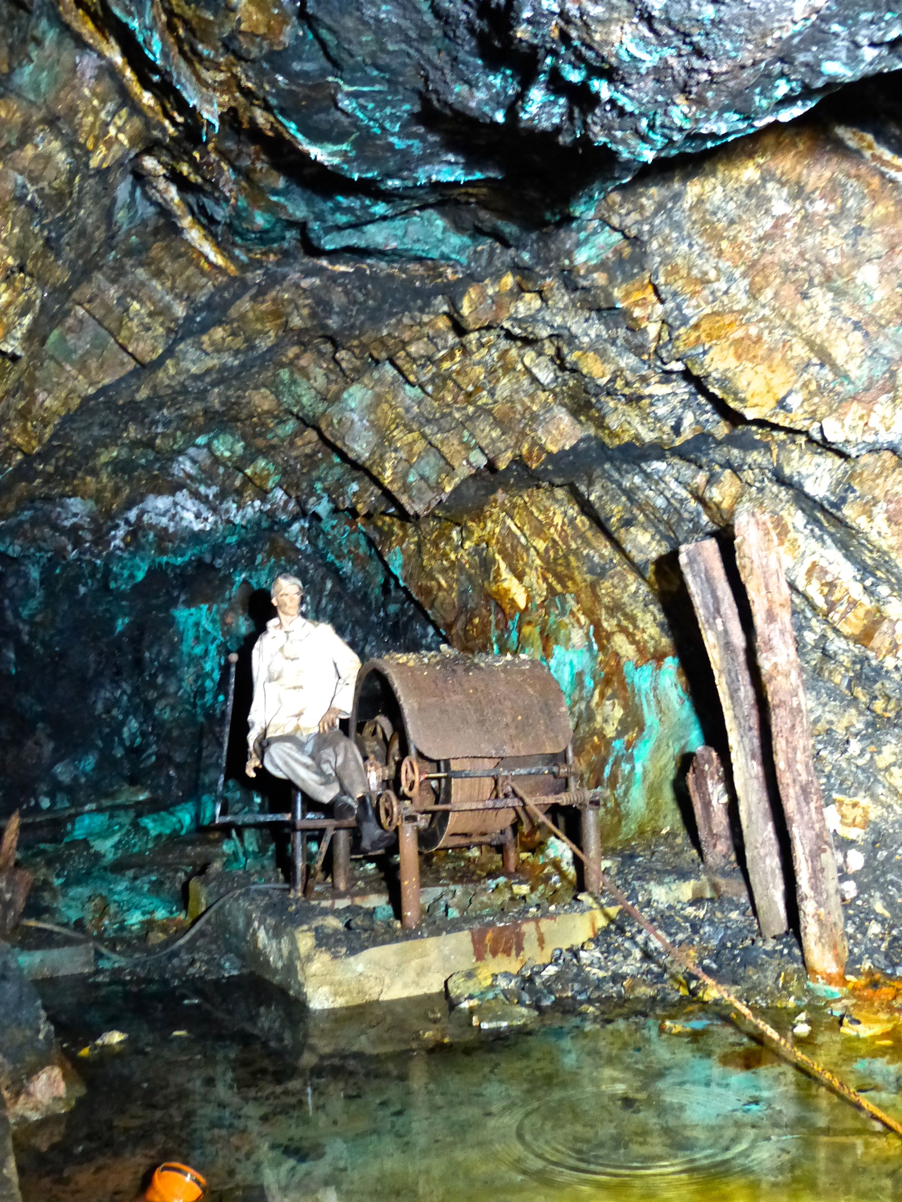 Kilianstollen (Neue Friederike) Blick in einen Abbau (Eisen- und Kupfermineralisation); Förderhaspel mit Haspelknecht